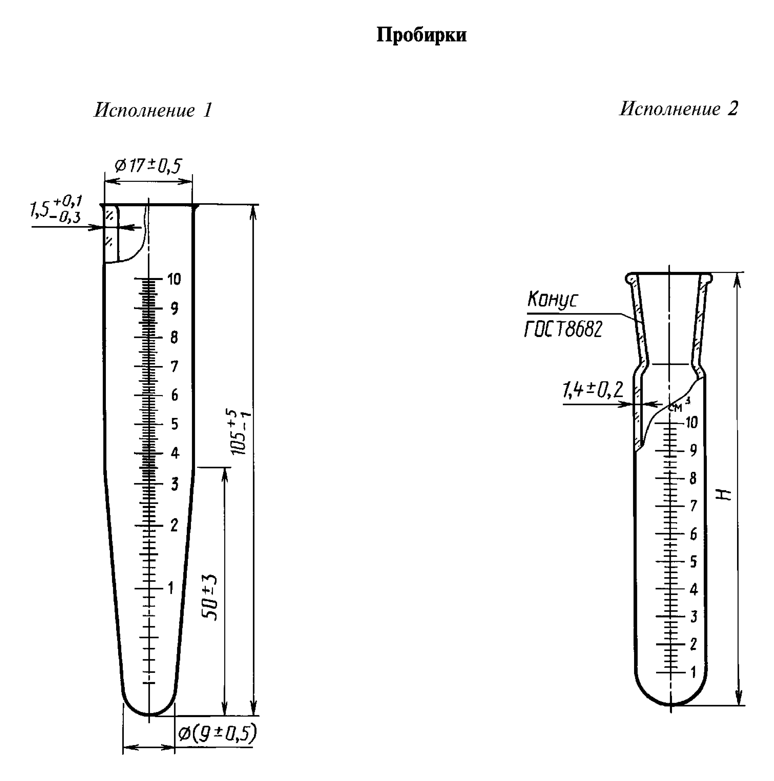 Градуированные пробирки по ГОСТ 1770-74. Исполнение 1 — коническая центрифужная пробирка